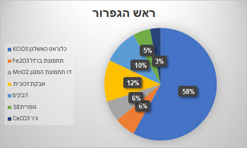 ראש הגפרור